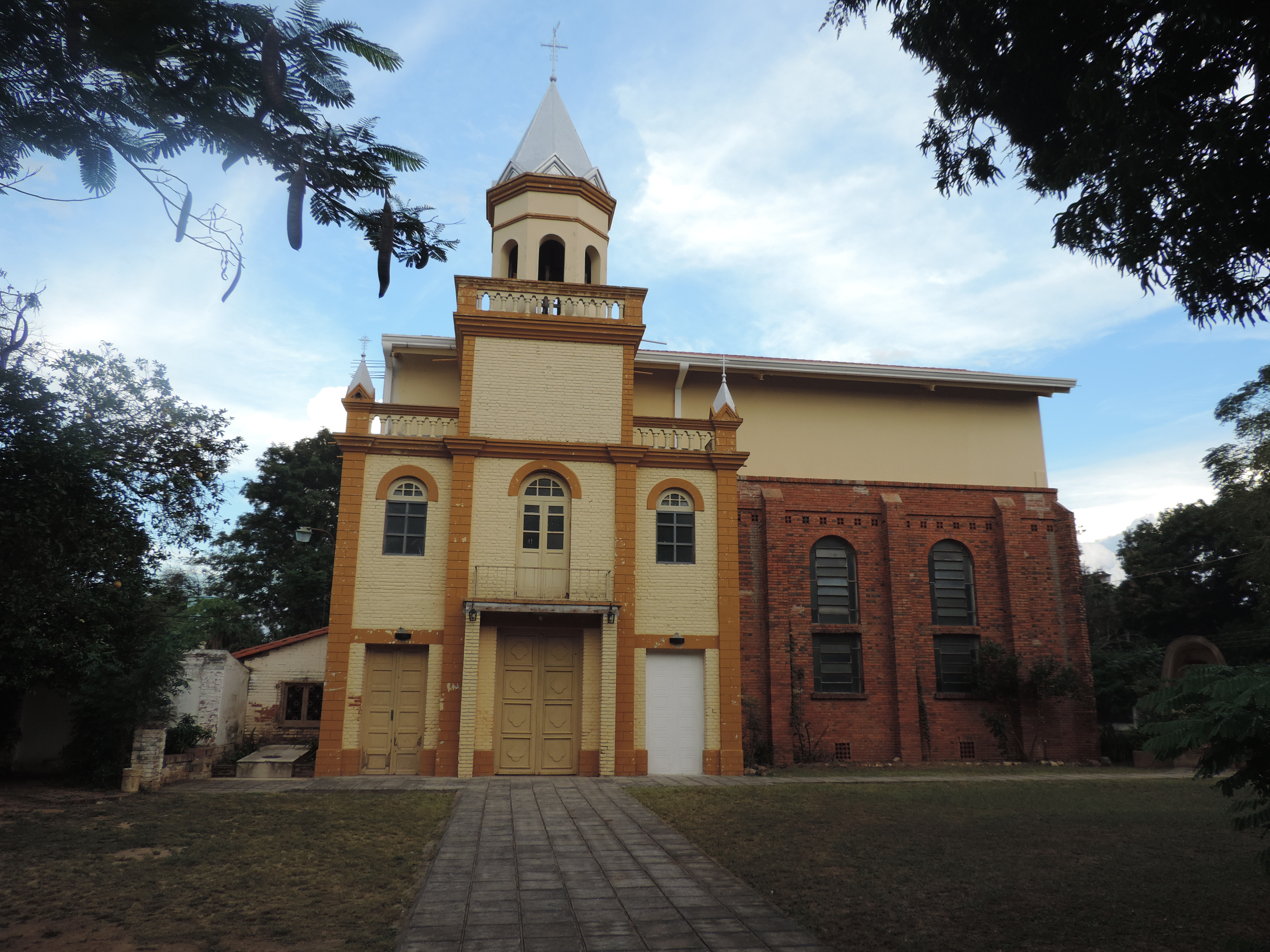 Catedral de Benjamin Aceval